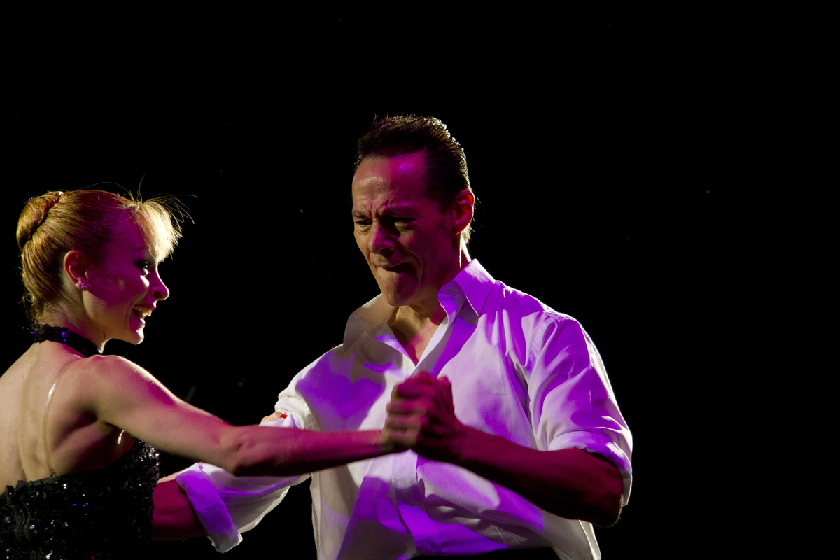 La compañía de Tango de Ana María Stekelman con Tangokinesis. ( Foto: Estrella Herrera)